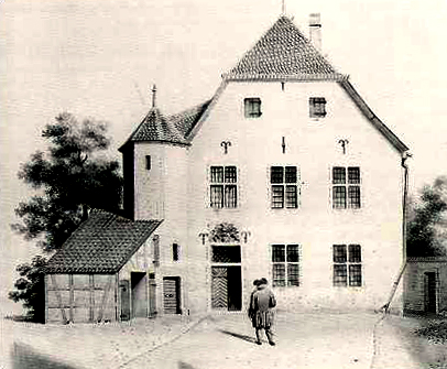 Köln, Die Kronenburse, ehemalige Rechtsschule um 1840